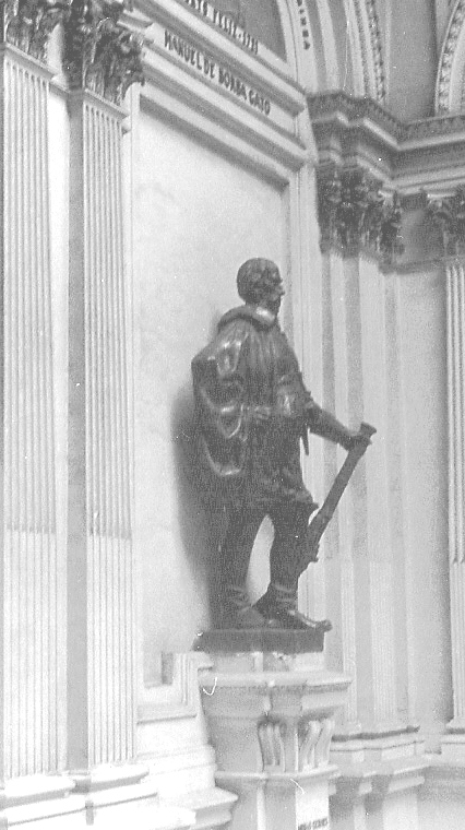 Manuel da Borba Gato (bandeirante), bonze, Nicola Rollo, Museu Paulista (Ipiranga).